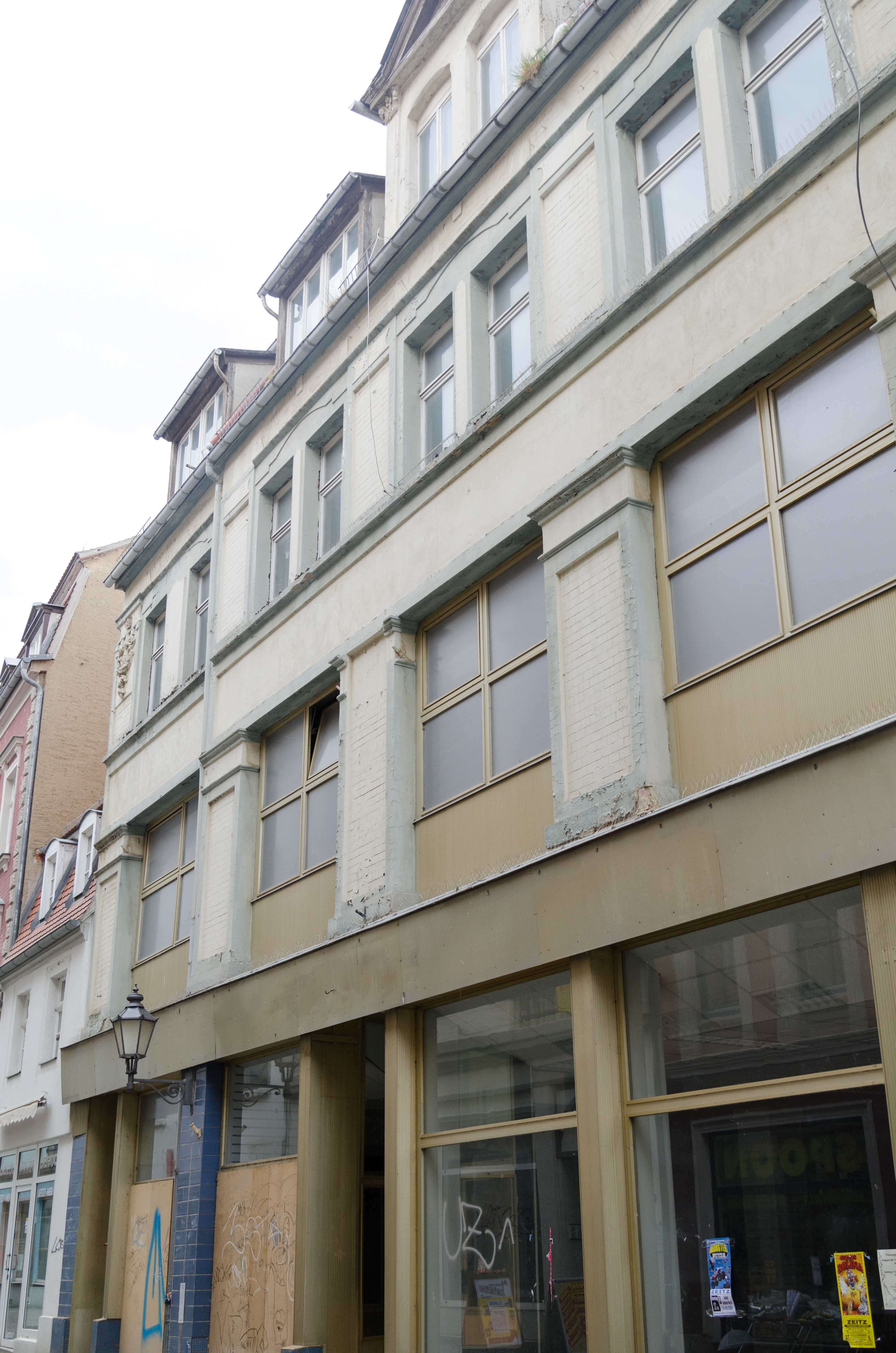 Zeitz, Kramerstraße 19